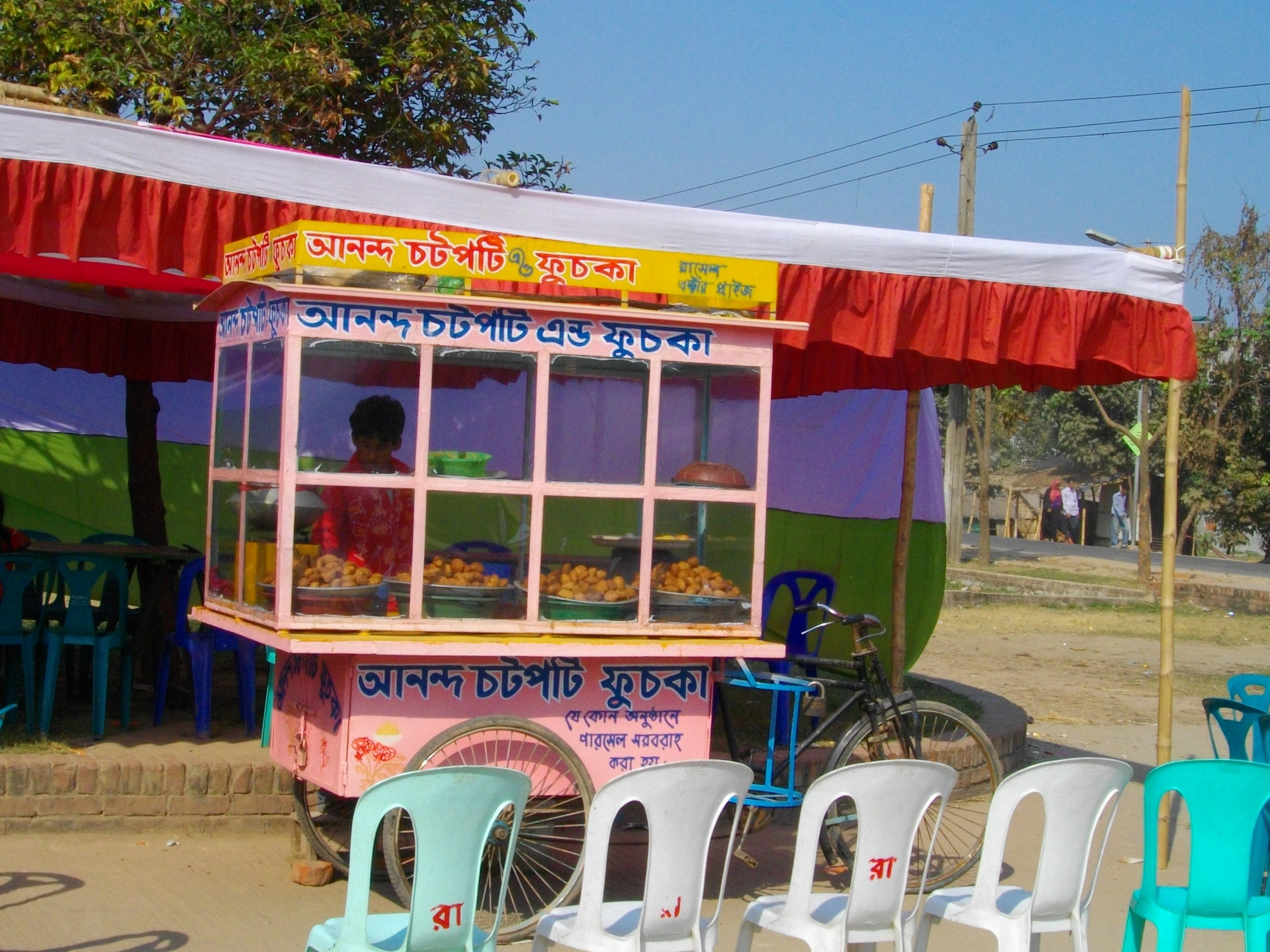 Van for vending Fuchka